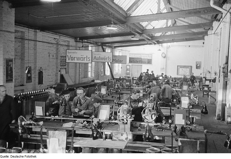 Original image description from the Deutsche Fotothek Lehrlinge verschiedener Lernaktive mit ihren Ausbildern an Werkbänken